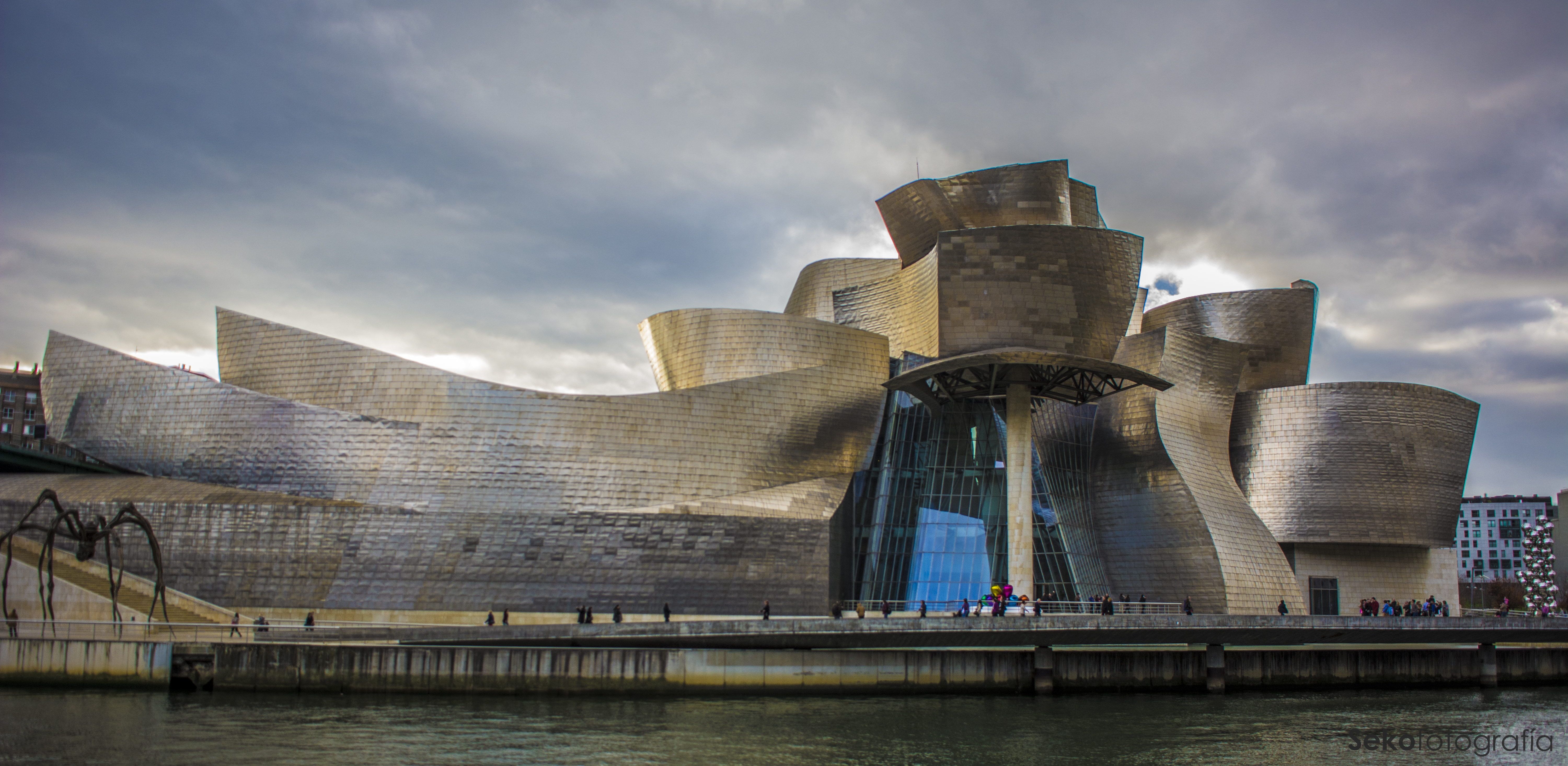 El Museo Guggenheim Bilbao (en euskera, Guggenheim Bilbao Museoa; en inglés, Guggenheim Museum Bilbao) es un museo de arte contemporáneo diseñado por el arquitecto canadiense Frank O. Gehry y localizado en Bilbao (País Vasco), España. Es uno de los museos pertenecientes a la Fundación Solomon R. Guggenheim. Fue inaugurado el 18 de octubre de 1997 por el rey Juan Carlos I de España. Las negociaciones para la construcción del museo entre las autoridades públicas de la comunidad autónoma del País Vasco y los directivos de la Fundación Guggenheim comenzaron en febrero de 1991. El acuerdo se firmó a finales de ese año, seleccionándose el arquitecto y el emplazamiento del edificio a mediados de 1992. Desde su inauguración en 1997, el museo ha recibido una media superior al millón de visitantes anuales, causando un impacto extraordinario en la economía y la sociedad vasca, impulsando el turismo en la región y promoviendo la revitalización de múltiples espacios públicos y privados en la villa, además de mejorar la imagen de la ciudad. La característica más llamativa del museo es el innovador edificio en el que se emplaza, constituido por formas curvilíneas y retorcidas, recubiertas de piedra caliza, cortinas de cristal y planchas de titanio. Cuenta con una superficie total de 24.000 m², de los cuales 10.540 m² están reservados para las exposiciones, distribuidos en 19 galerías. Se ubica a orillas de la ría de Bilbao, en una zona denominada Abandoibarra, junto al puente de La Salve, que está rodeado por una torre hueca. El 3 de diciembre de 2014 el patronato del Museo Guggenheim Bilbao aprobó renovar por otros 20 años la colaboración con la Fundación Solomon R. Guggenheim de Nueva York, suscrita en 1994 y cuya vigencia vencía el 31 de diciembre. Fuente: Wikipedia.